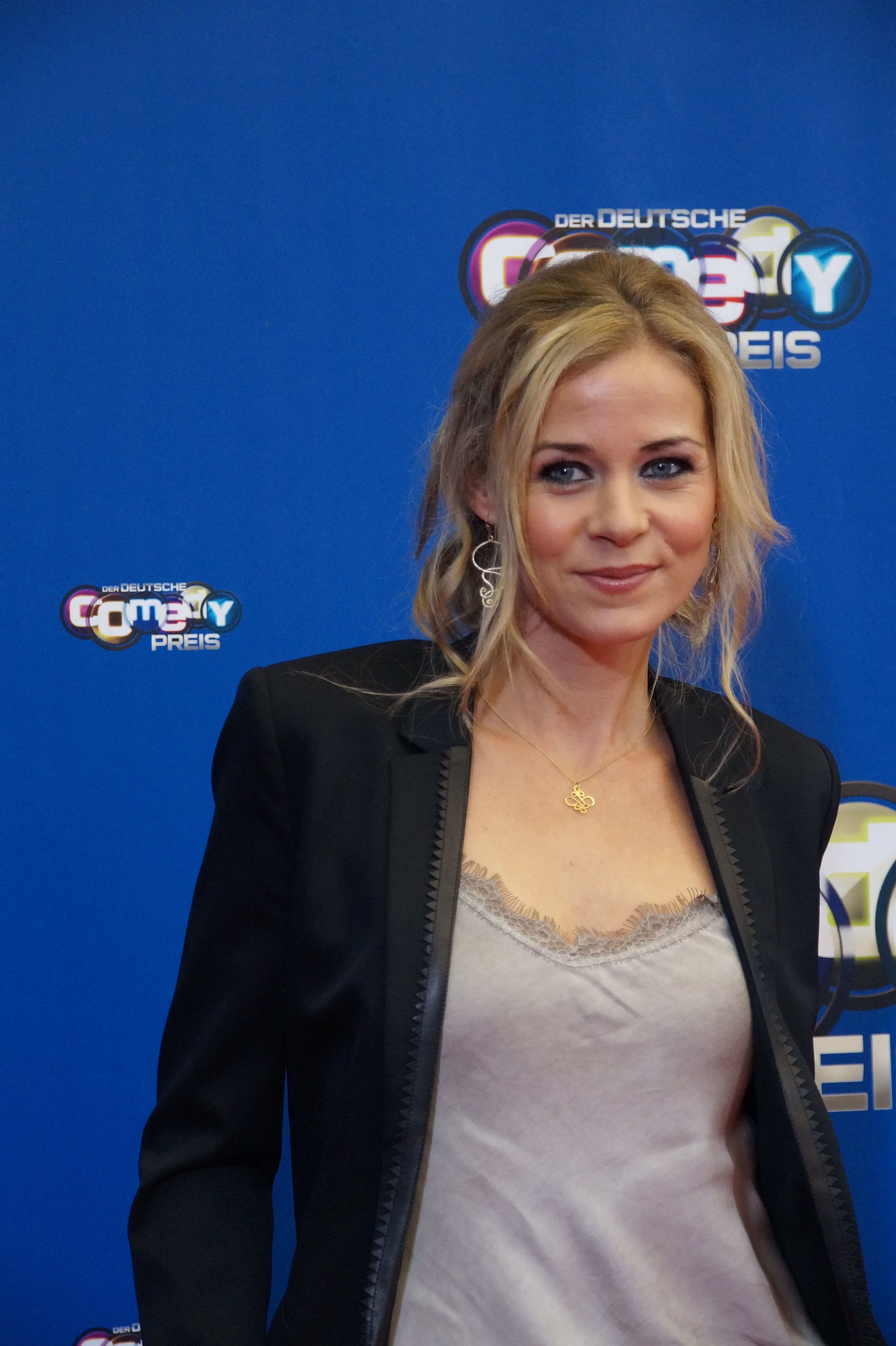 Jessica Ginkel beim Comedypreis 2016, im Oktober, Köln.